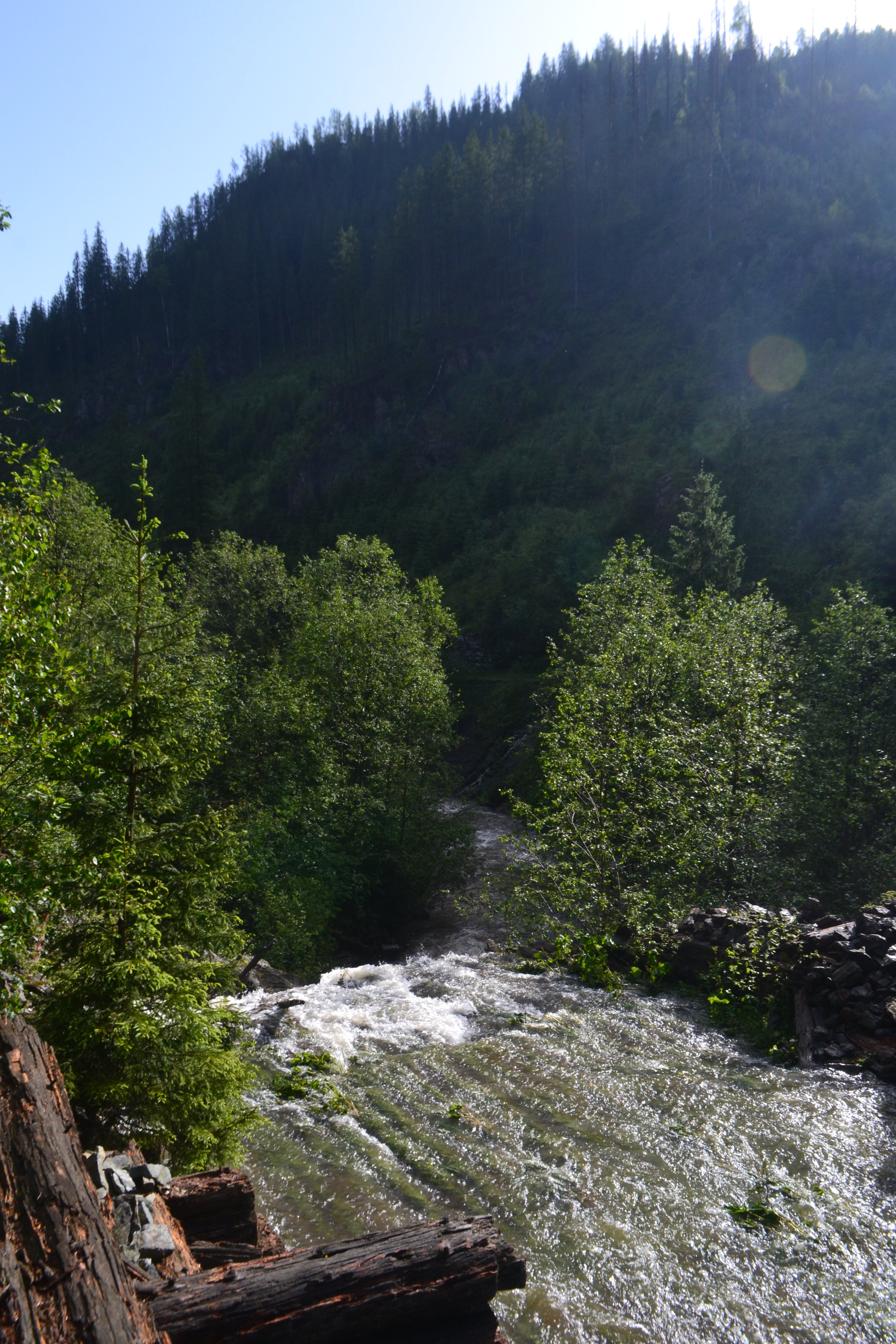 Клявза на річці Перкалаб - вид на дамбу